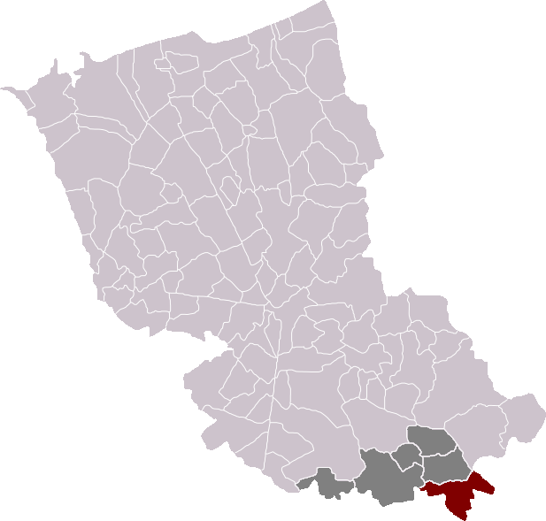 Locatie gemeente De Gorge in arrondissement Duinkerke. Zelfgemaakt. Location of La Gorgue municipality in the arrondissement of Dunkirk. Self made. Localisation de la commune de La Gorgue dans l'arrondissement de Dunkerque. Fait moi-même.